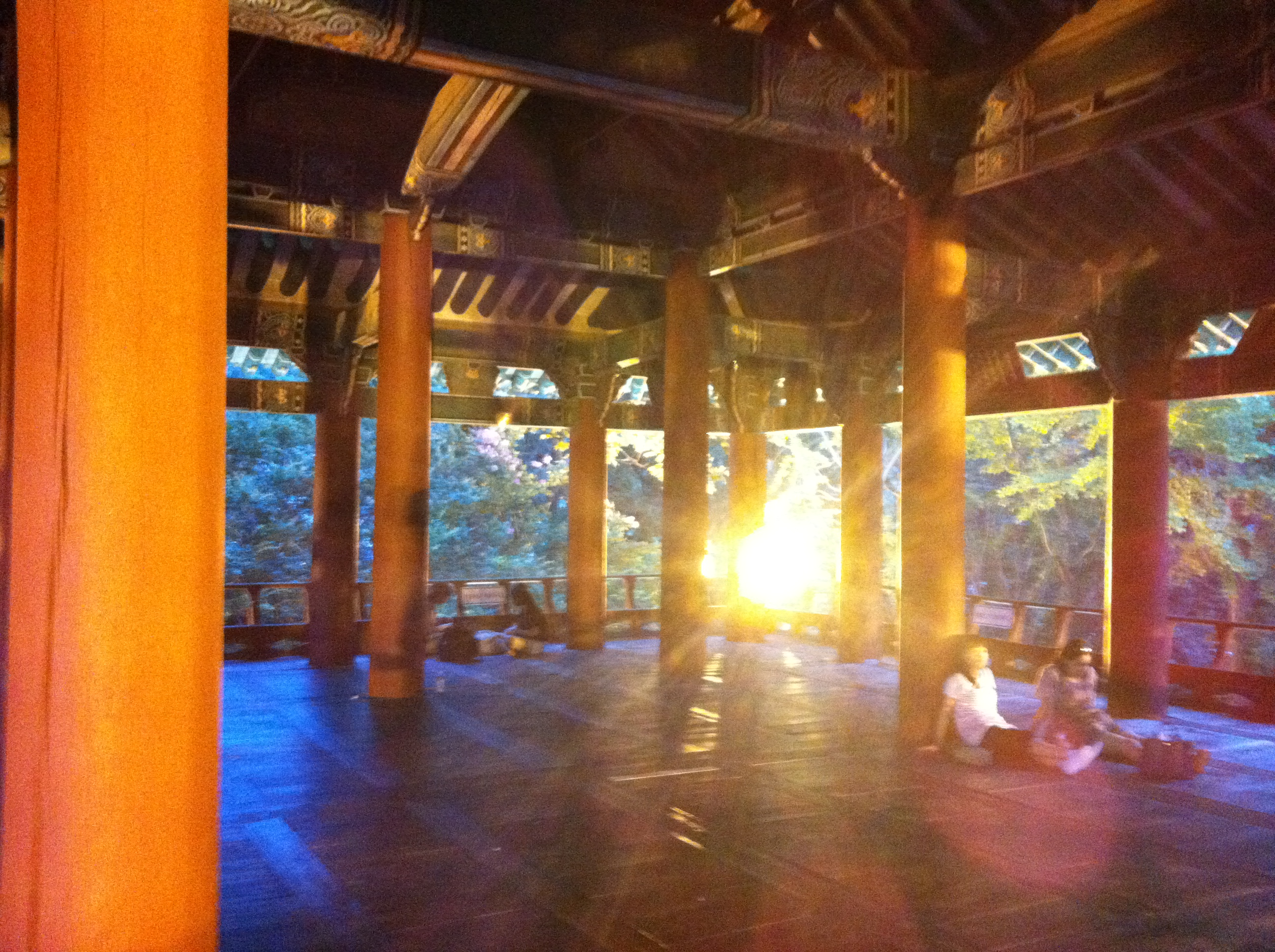 전주한옥마을 풍경